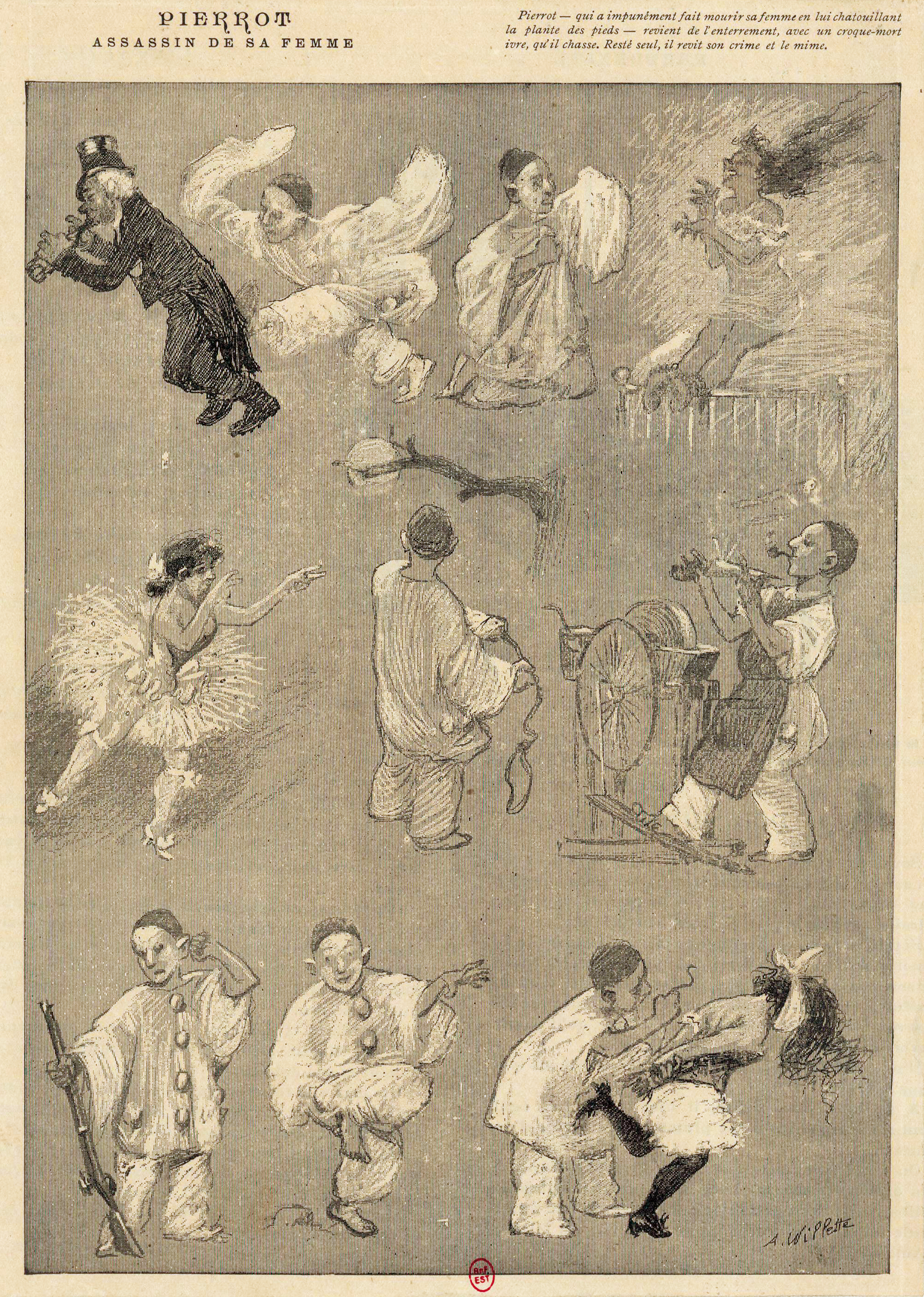 Gravure. Revue illustrée, tome 6, juin-décembre 1888, p. 410.